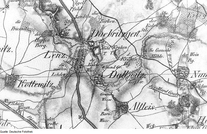 Original image description from the Deutsche Fotothek Priestewitz-Lenz. Oberreit, Sect. Großenhain, 1841/43